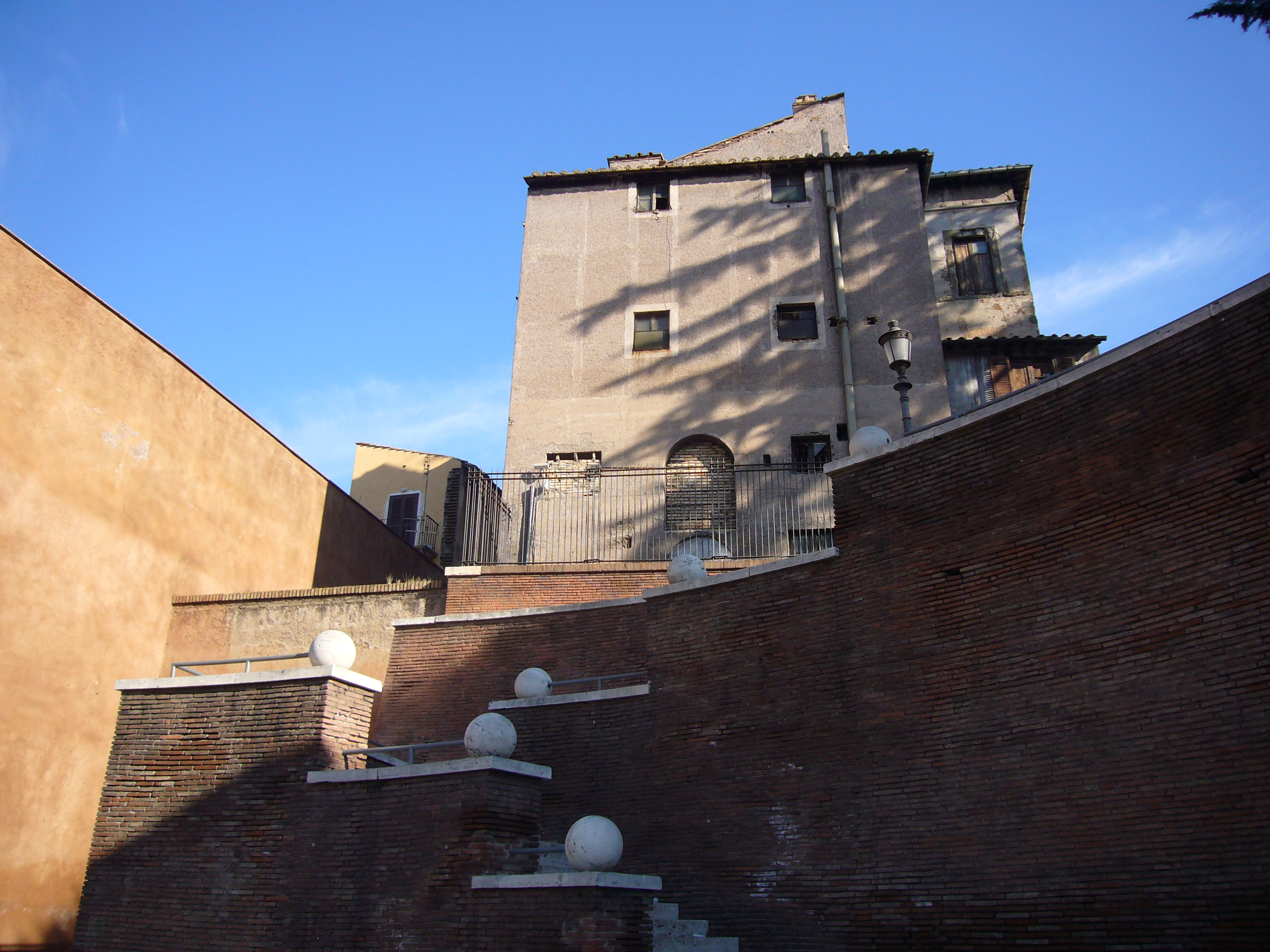 Roma, palazzo Rivaldi. Edificio verso via dei Fori Imperiali.